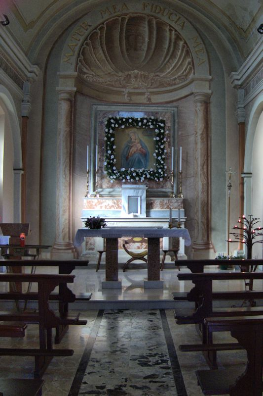 Interno del santuario della Madonna della Nave